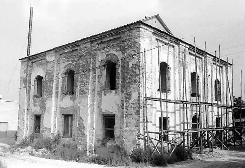 Синагога (мур.), Берестечко